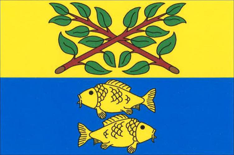 Rokytno, okres Pardubice, vlajka